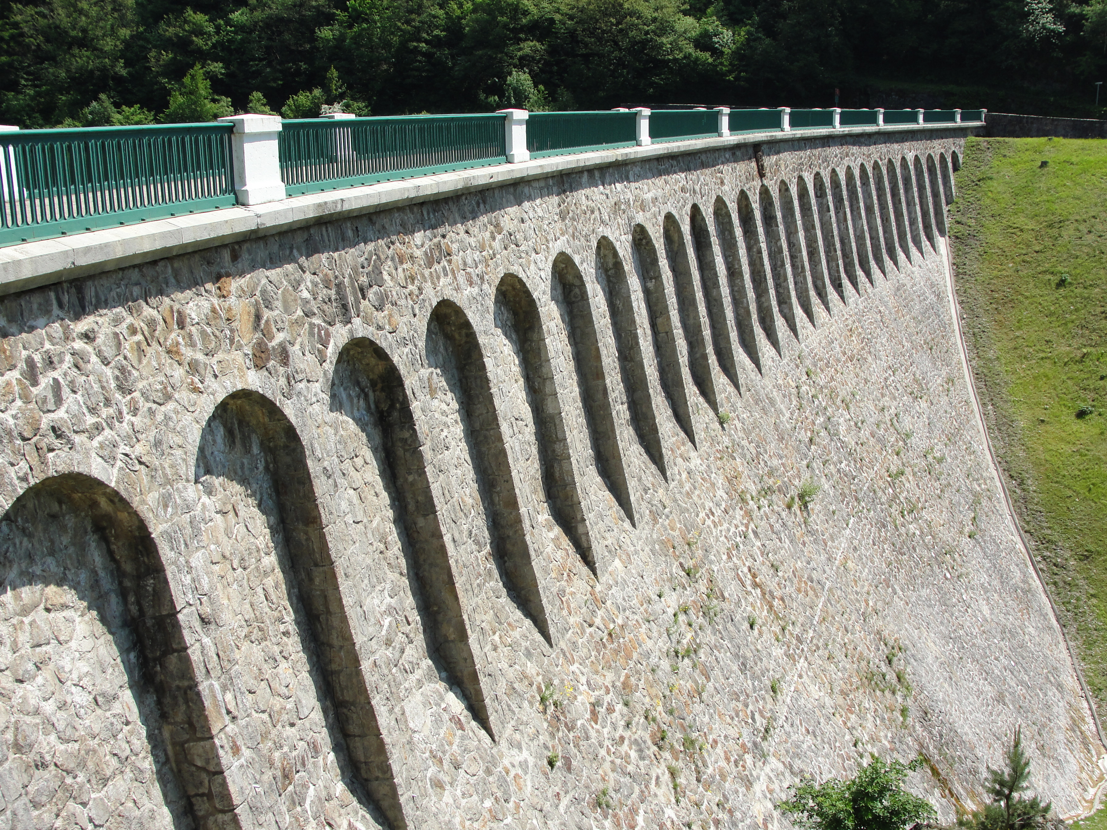 Barrage de l'Ondenon (1904) - La Ricamarie, Loire.